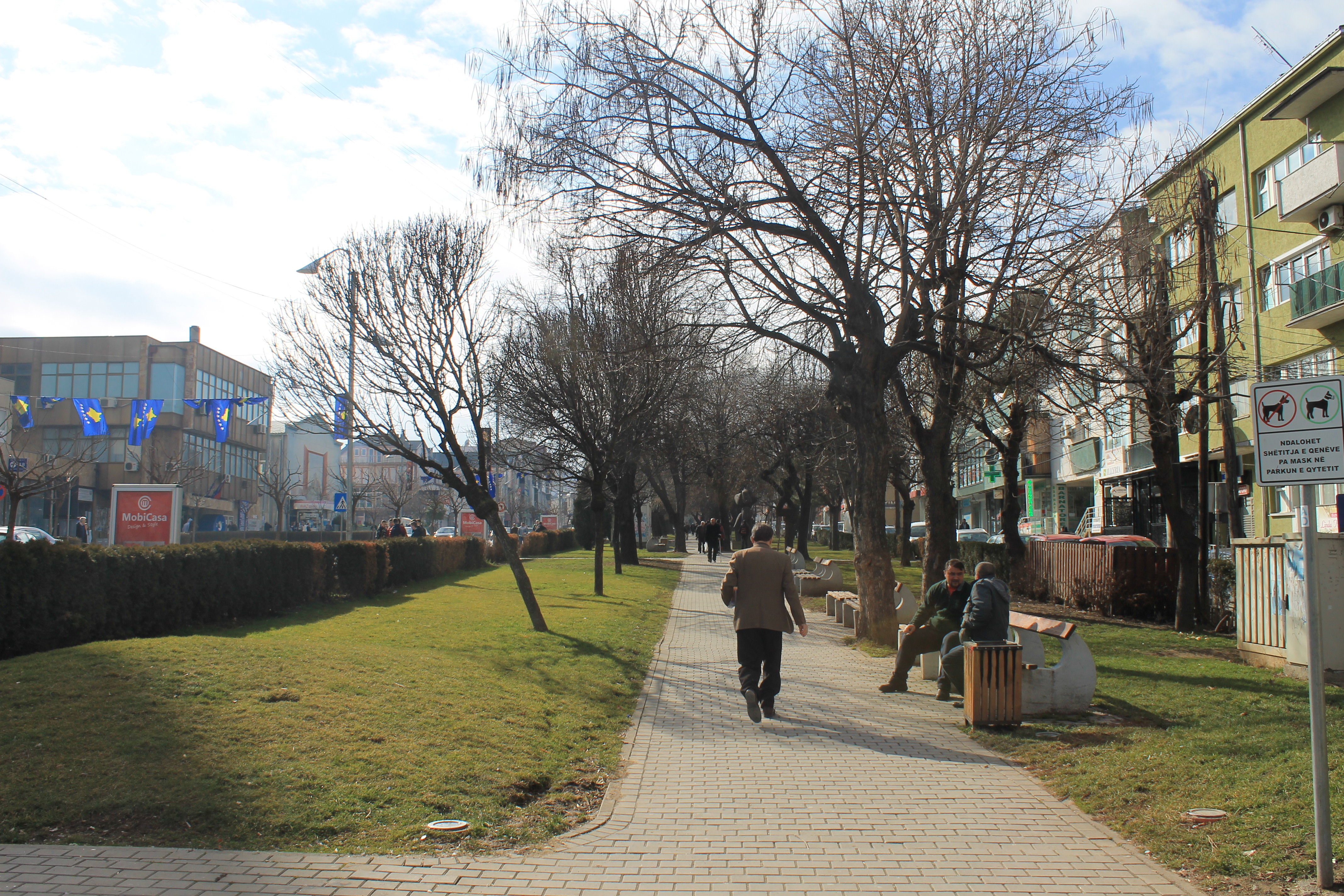 Parku në Qytetin e Gjilanit.